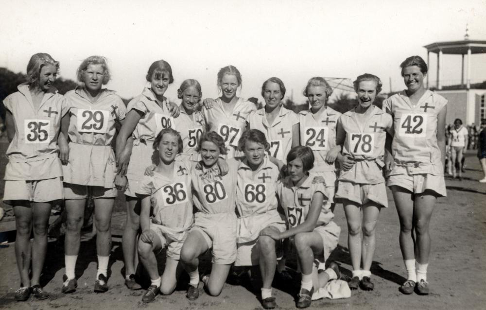 Women’s World Games 1926 / Andra Internationella Kvinnliga Idrottsspelen, Göteborg 1926. Swedish athletes/svenska laget: standing from left to right/stående från vä: Inga Gentzel (35), Elsa Svensson (29), Inga-Greta Broman (98), Emy Pettersson (50), Ruth Svedberg (97), Elsa Haglund (37), Anna-Lisa Adelsköld (24), Sylvia Stave (78), Ann-Margret Ahlstrand (42) kneeling from left to right/knästående fr vä: Asta Plathino (36), Märta Johansson (80), Vera Jacobsson (68), Maud Sundberg (57)